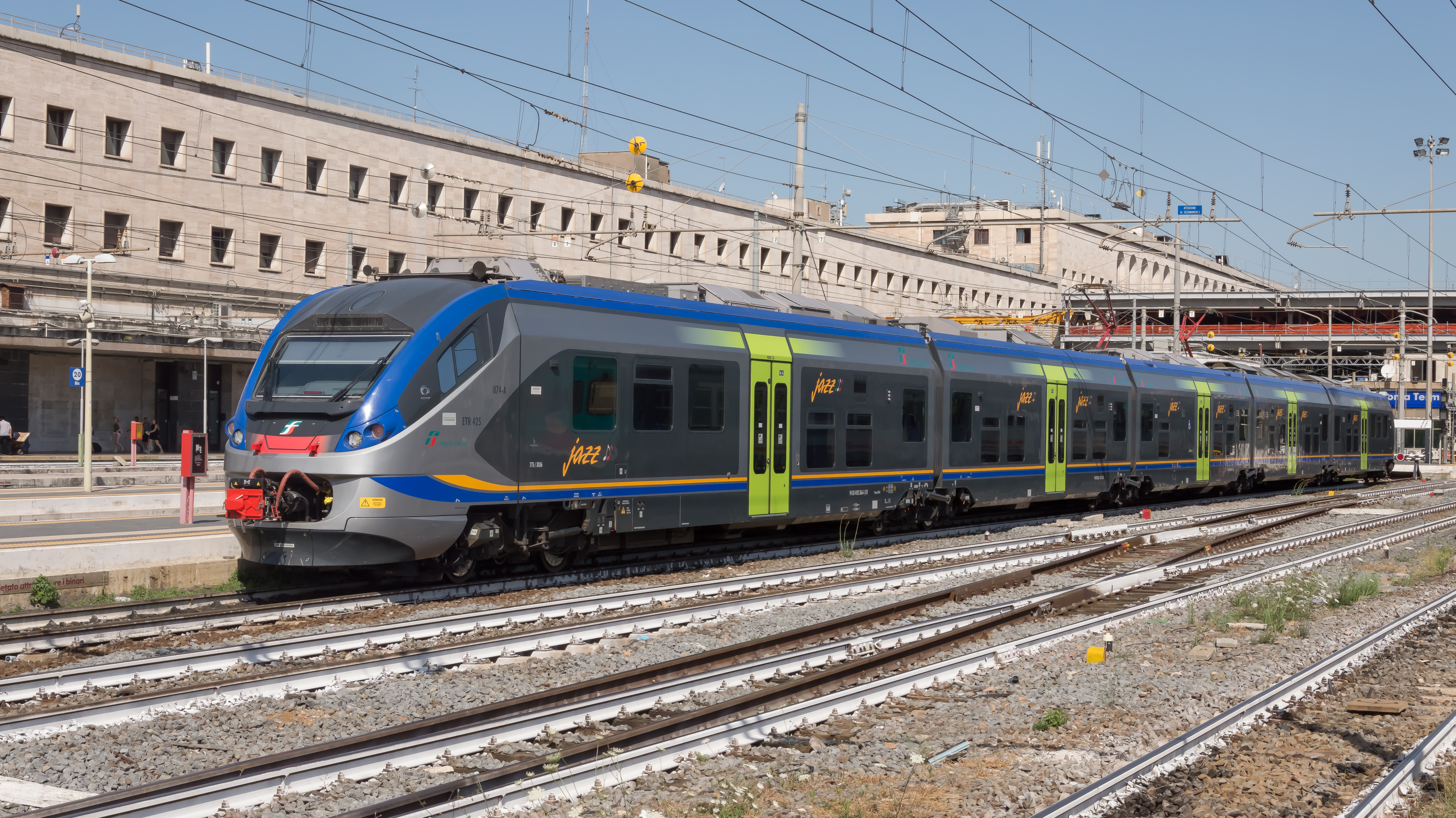 Elettrotreno ETR.425.074 di Trenitalia (tipo "Jazz") in sosta a Roma Termini.